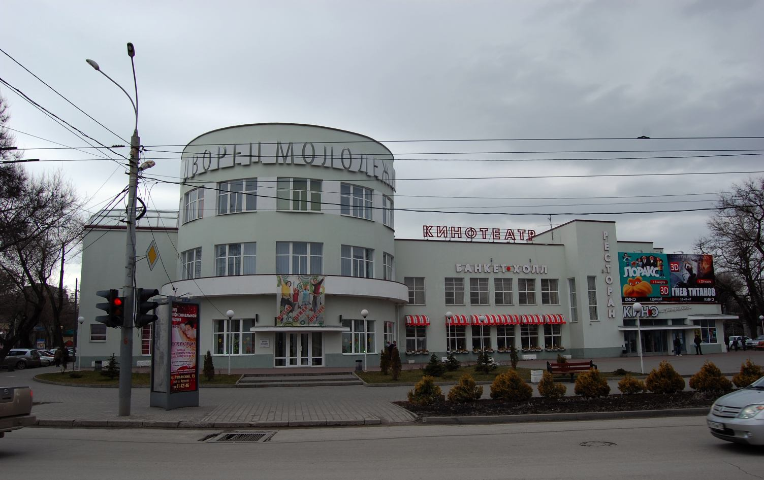 Таганрогский дворец молодёжи. Таганрог, ул. Петровская, 107